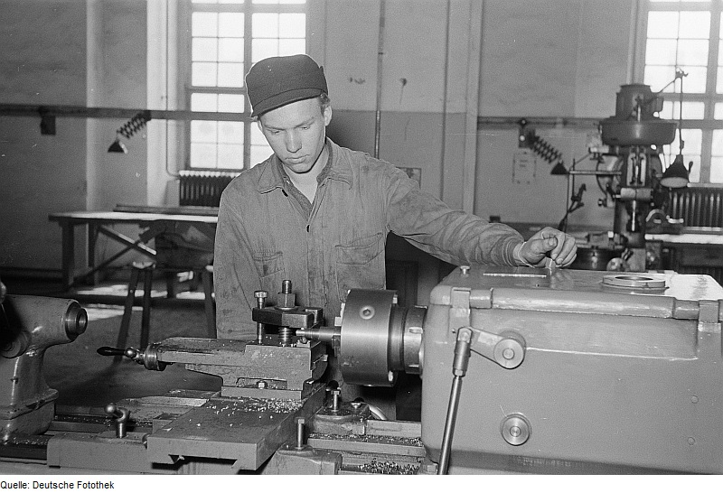 Original image description from the Deutsche Fotothek Porträt eines Arbeiters in einer Werkstatt